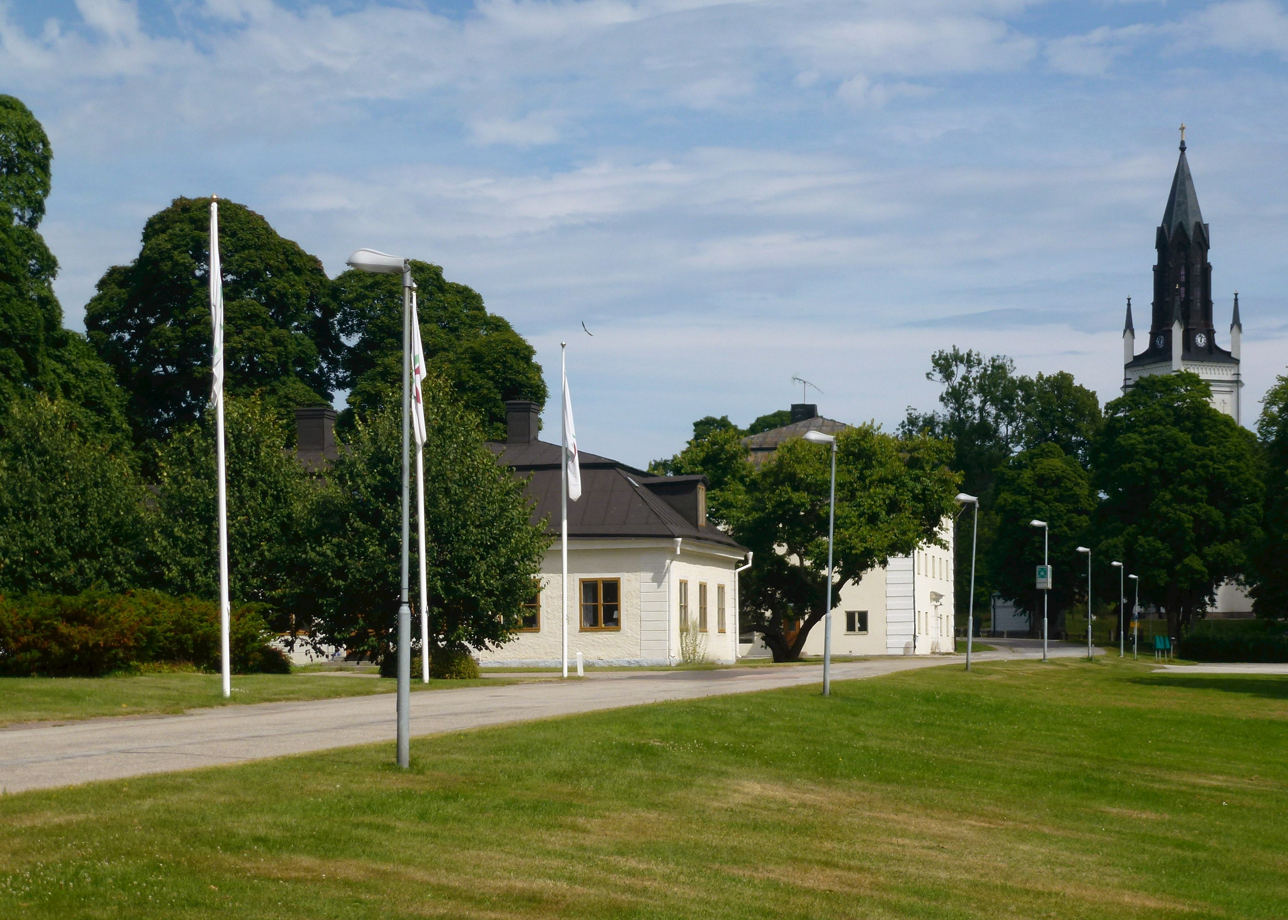 Skinnskattebergs herrgård med Skinnskattebergs kyrka i bakgrunden